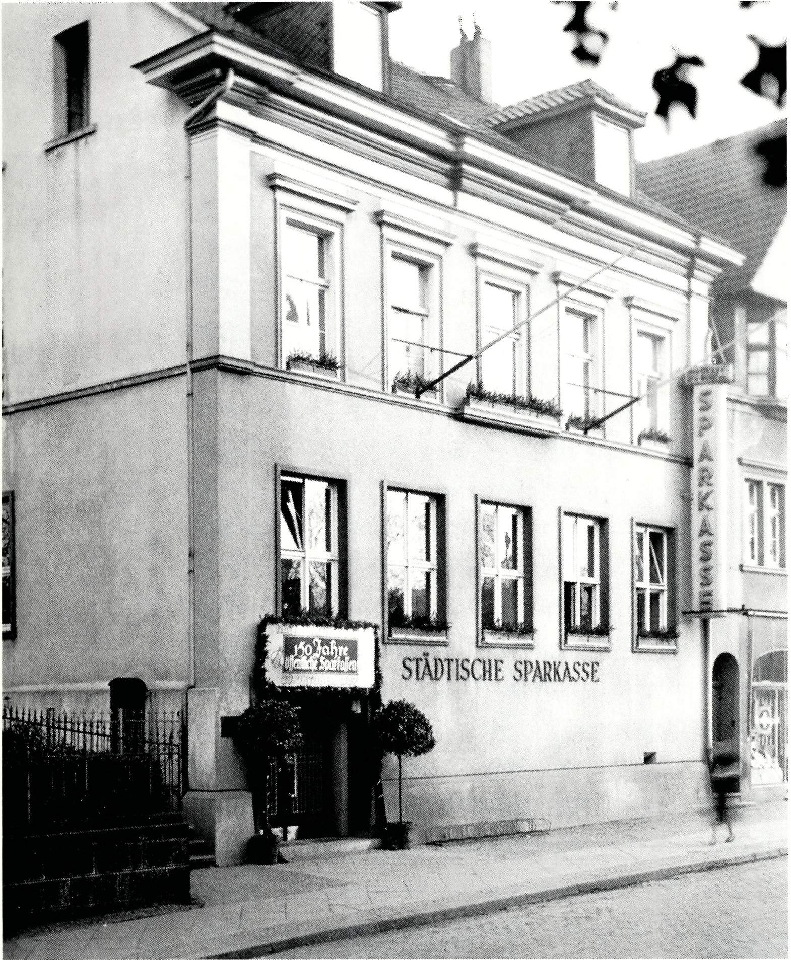 Städtische Sparkasse Opladen